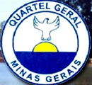 Brasão de Armas do município de Quartel Geral, MG, Brasil.